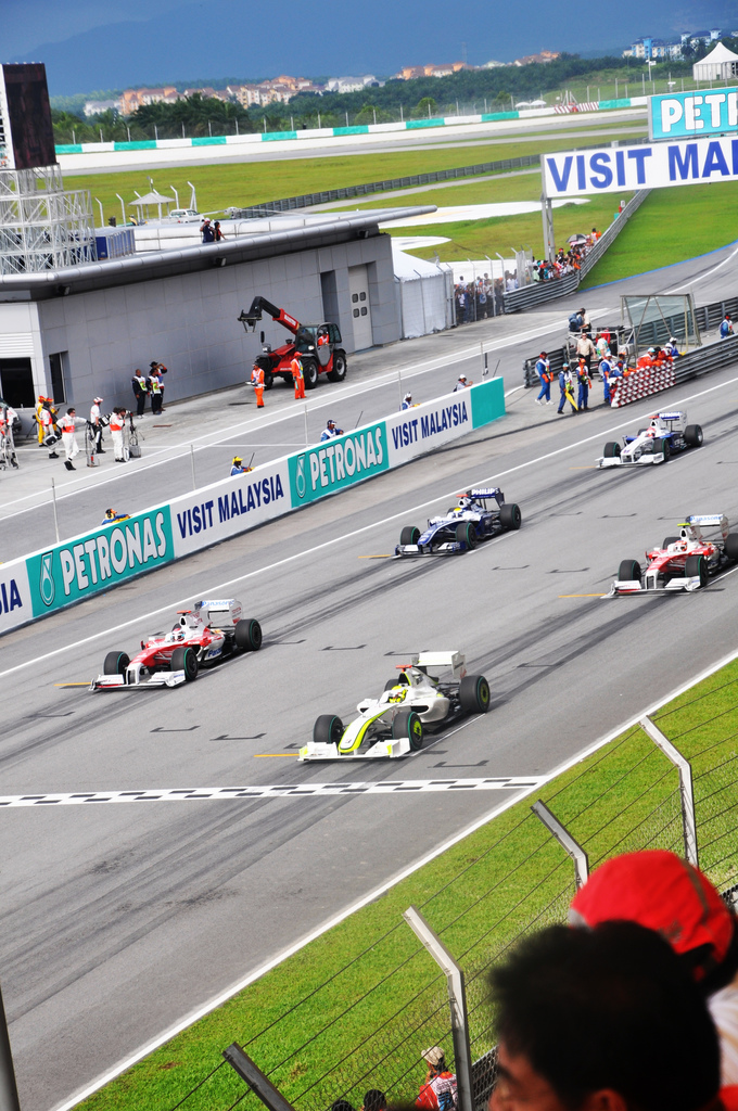 départ du GP de malaisie 2009